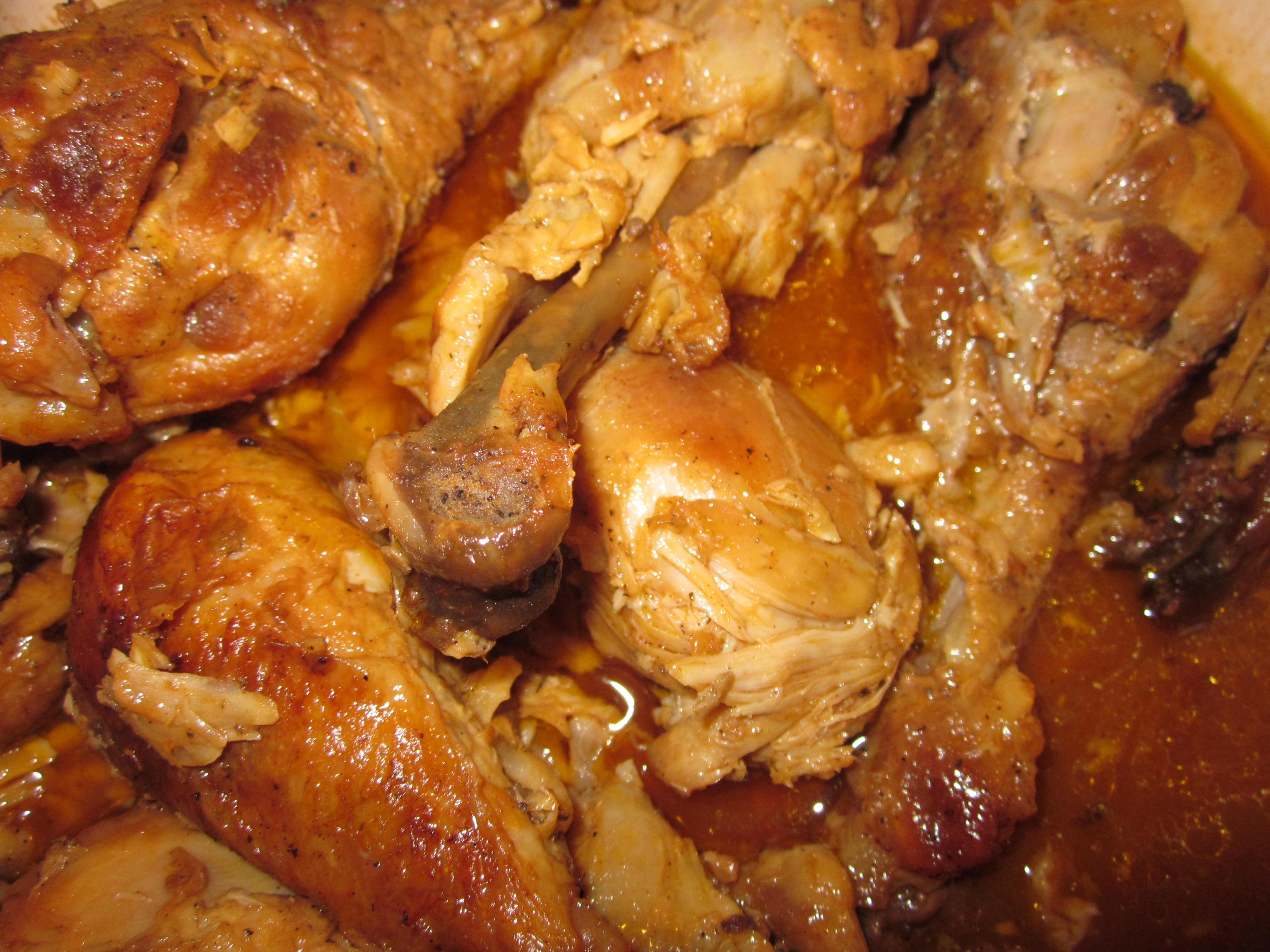 Homemade chicken adobo